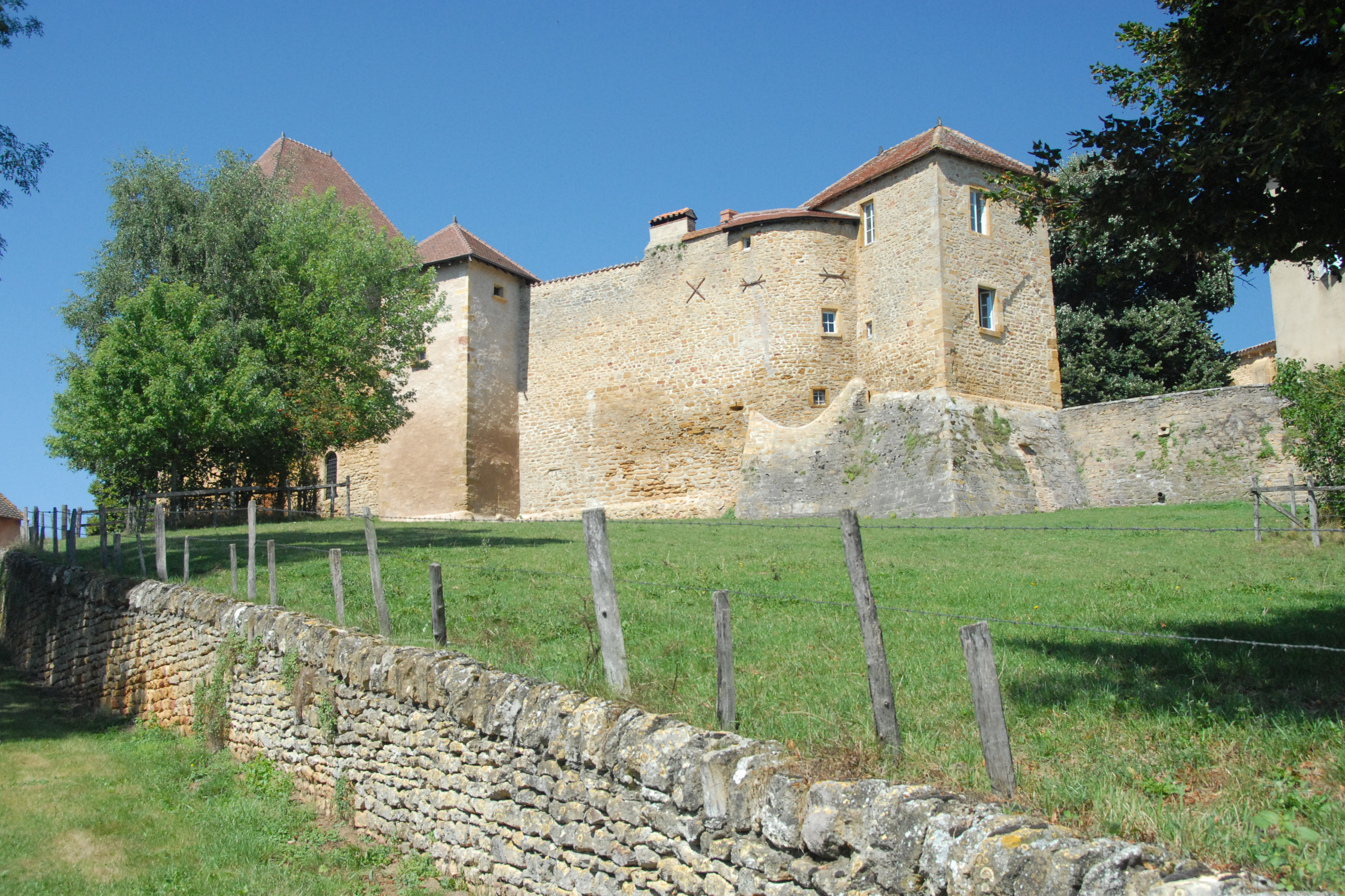 ehem. südliche Klostergebäude